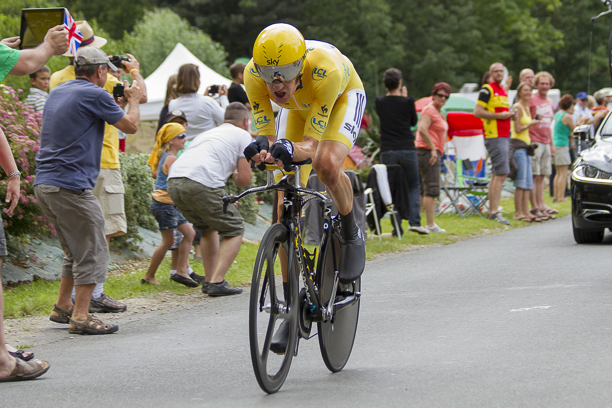 Le maillot jaune Bradley WIGGINS (SKY) en action - 19e étape du Tour de France 2012, Contre la montre individuel entre Bonneval et Chartres (Eure-et-Loir) à Morancez (45 km) le samedi 21 juillet 2012 - © William Morice / MaxPPP.